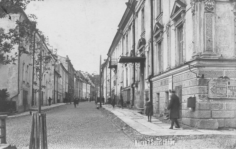 Suur tänav (Narva)